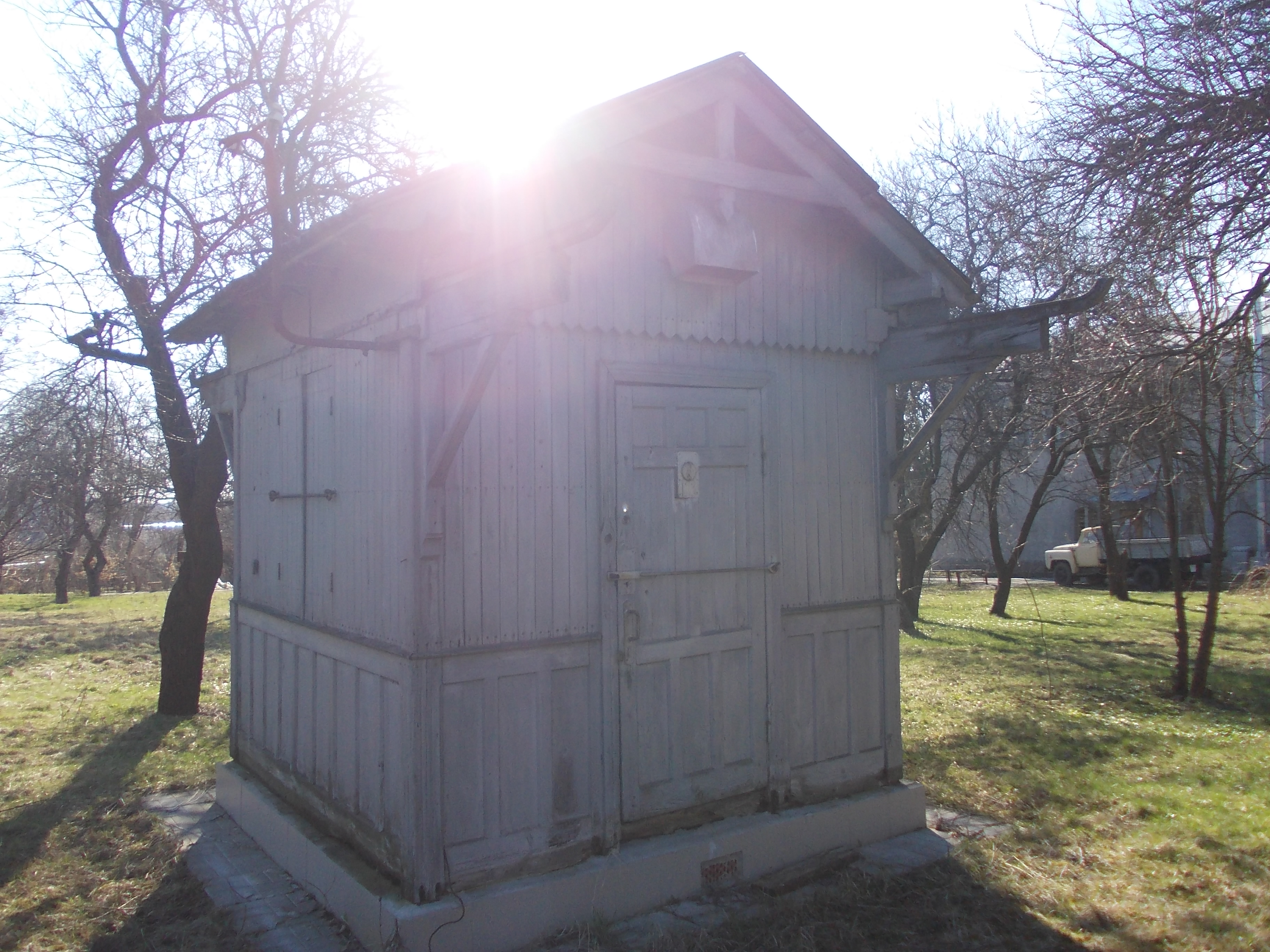 Територія Полтавської гравіметричної обсерваторії. Один із павільйонів.